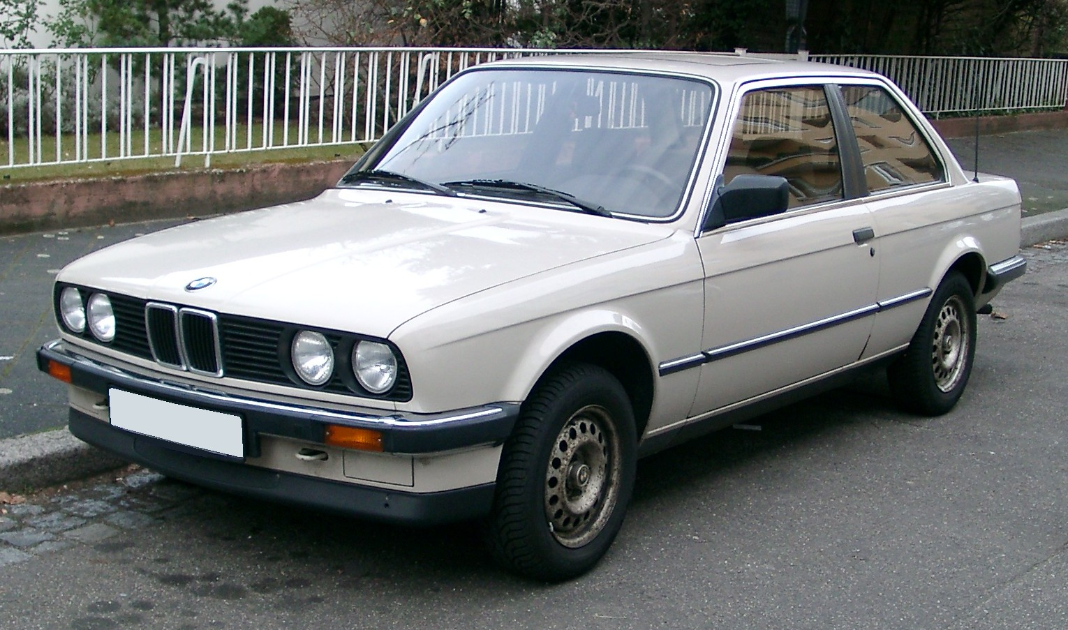 BMW E30